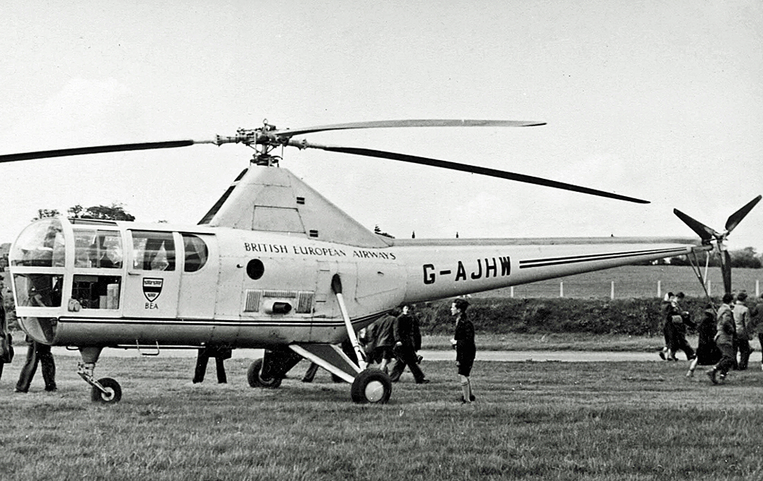 BEA Sikorsky S-51 G-AJHW in 1953